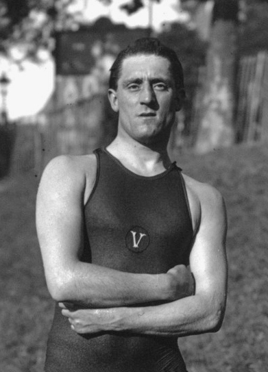 Meeting [international de l'Auto], Pont de Puteaux, 15 août 09 : Radmilovic [Anglais] gagnant du handicap et des 500 mètres [du Criterium international de natation dans la Seine] : [photographie de presse] / [Agence Rol]